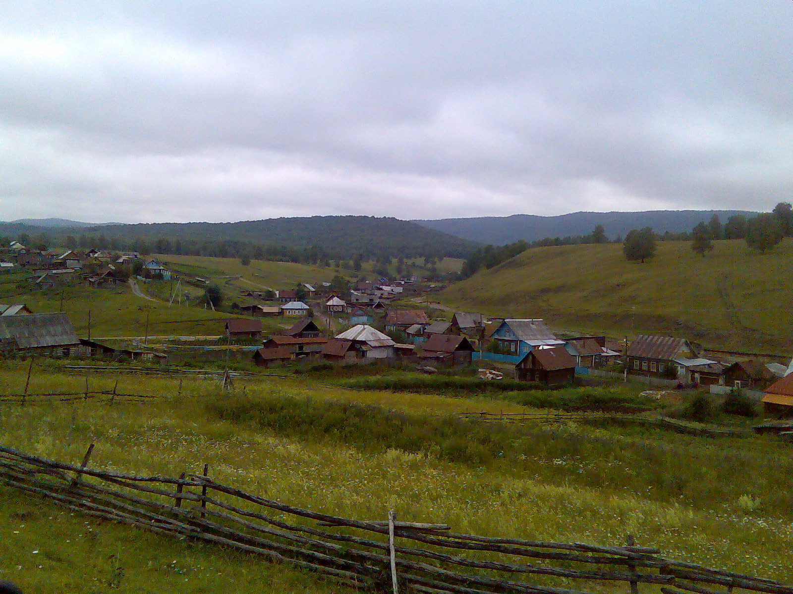 Нукатово